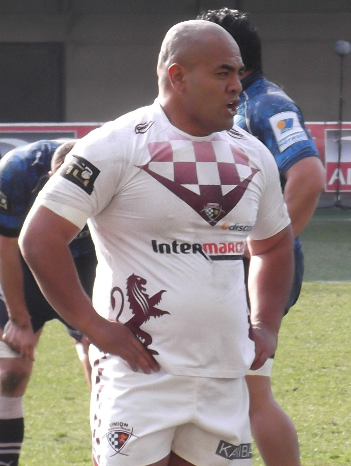 Tamato Leupolu (Union Bordeaux Begles) contre Montpellier.